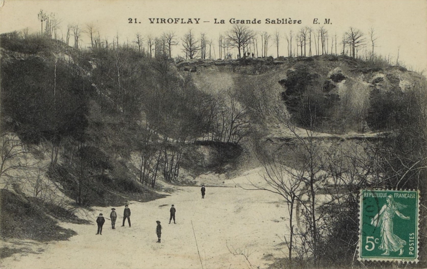 Carte postale du début du XXe siècle avec en photo la grande sablière de Viroflay aujourd'hui disparu suite à son comblement.